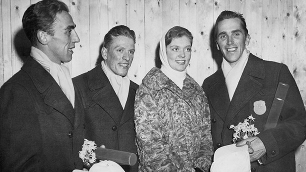 Prinsessan Birgitta gratulerar (från vä till hö) Stig Sollander som tog brons i herrarnas specialslalom, Beng Eriksson silver i kombinerat och Sigge Ericsson guld på 10 000 m skridsko i Cortina 1956.